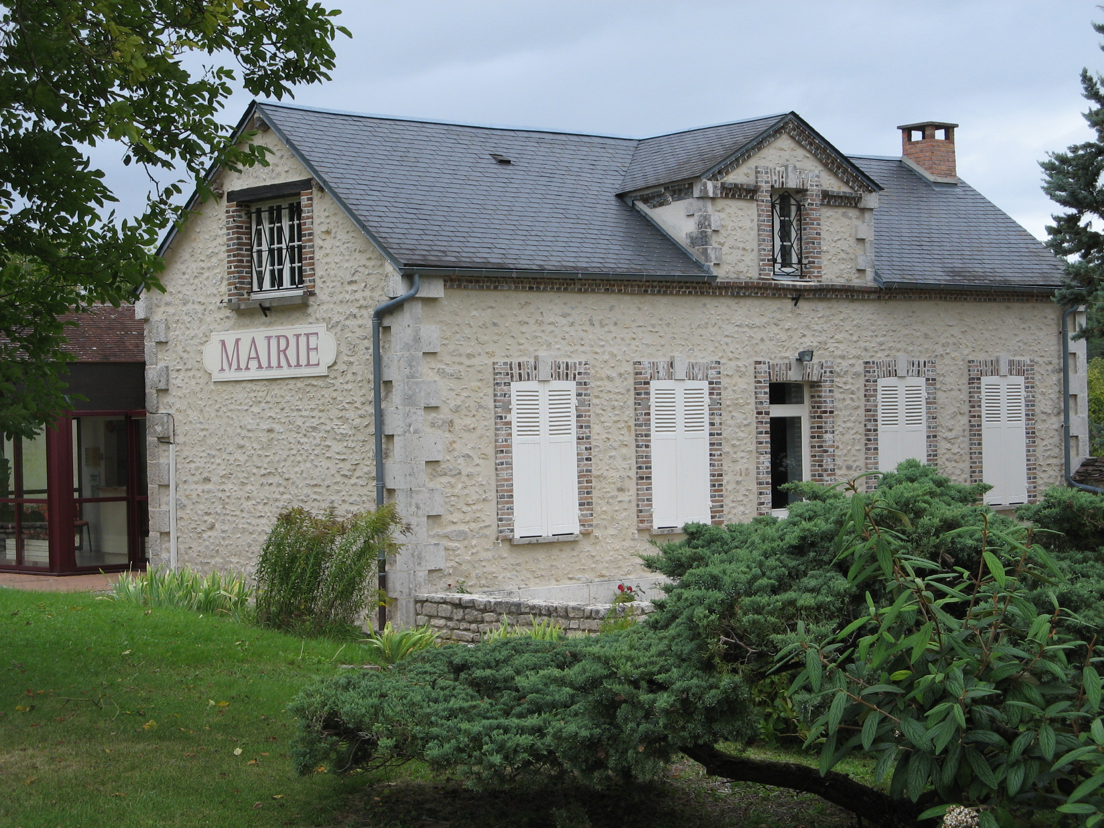 Mairie de Paley, France.